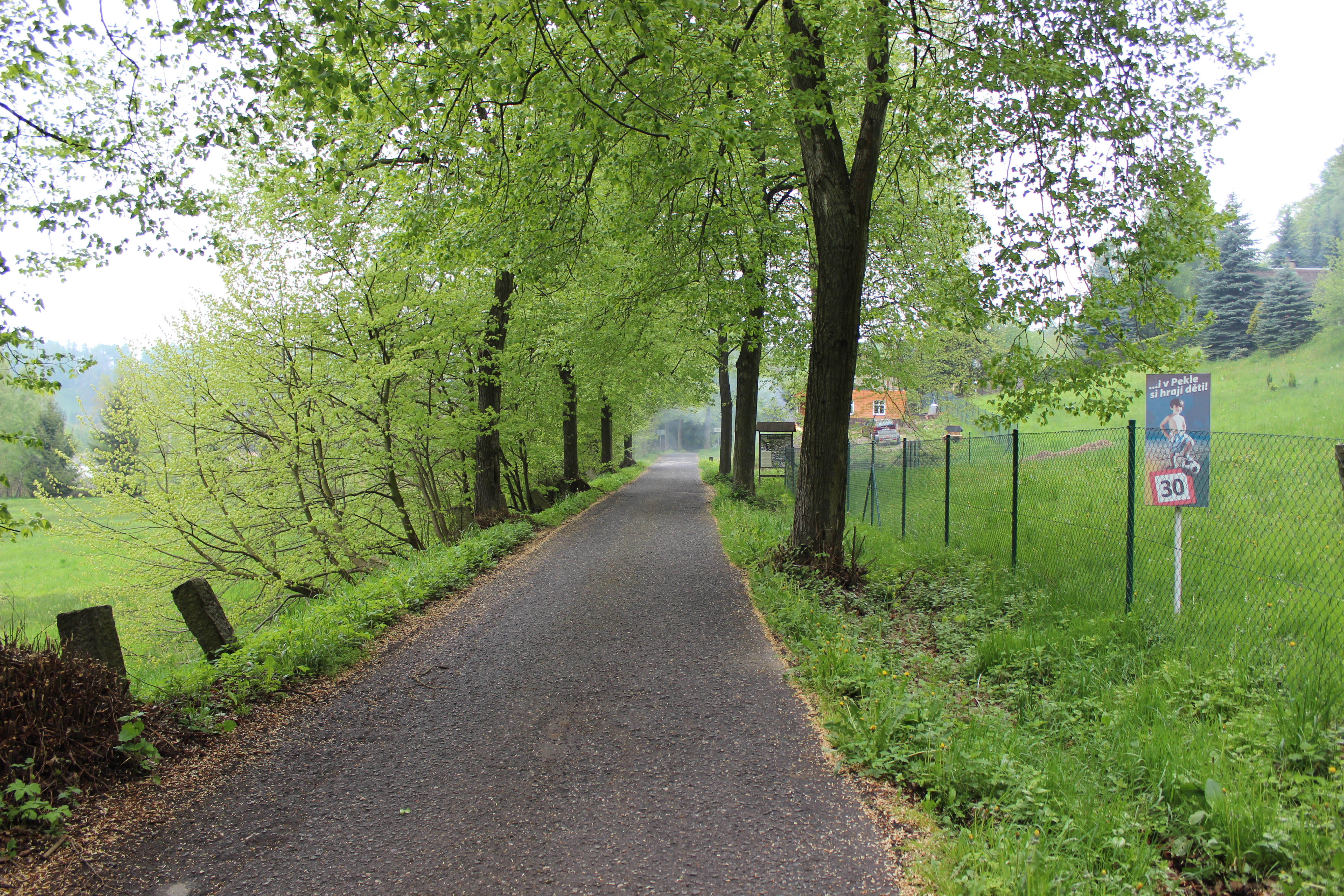 Silnice v Pekle, části Raspenavy (pohled od jihozápadu).